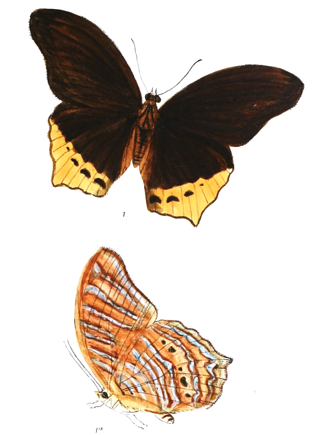 Terinos clarissa (male)